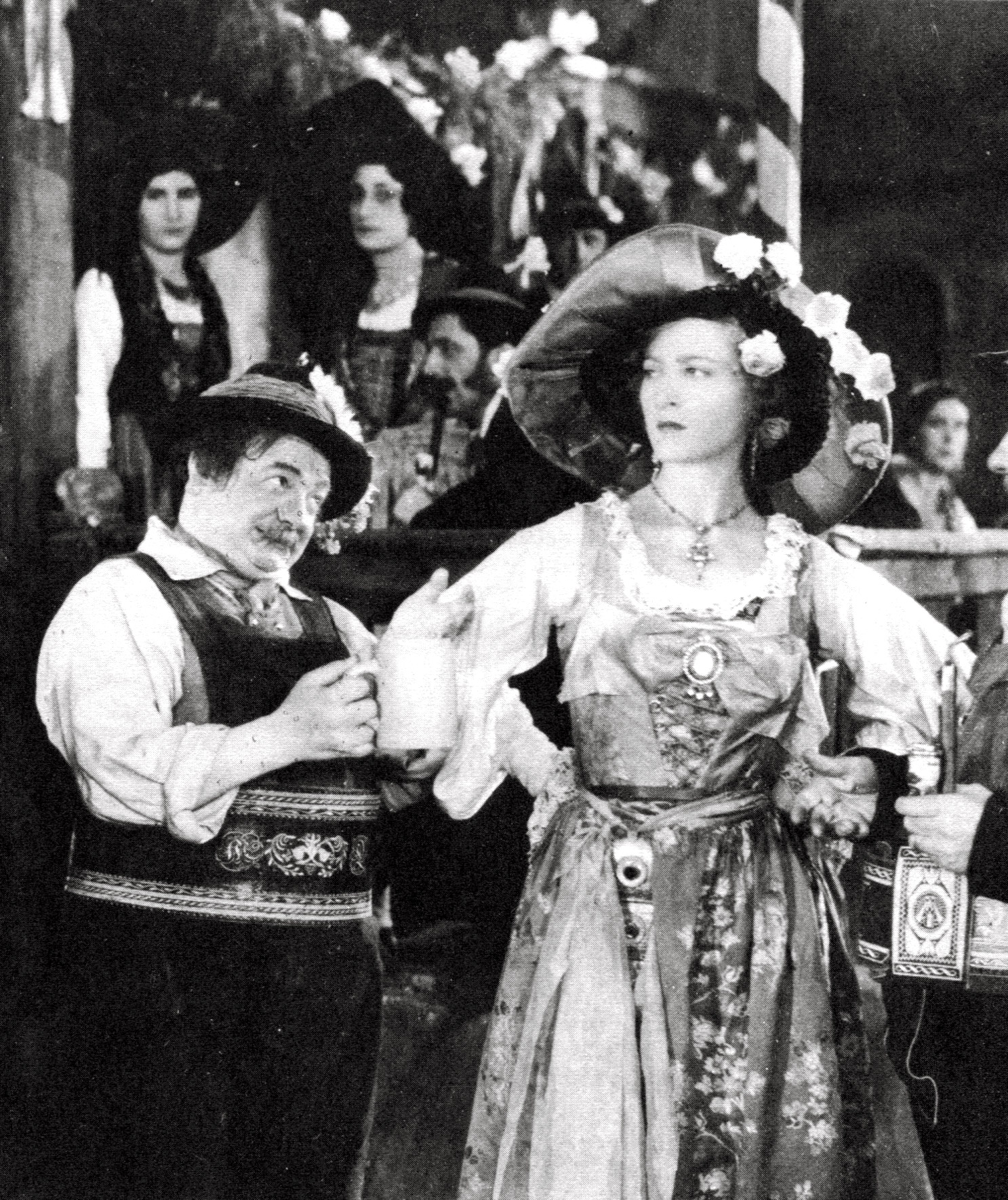 Una scena del film La Wally (Brignone, 1932) con Germana Paolieri e Giuseppe Pierozzi